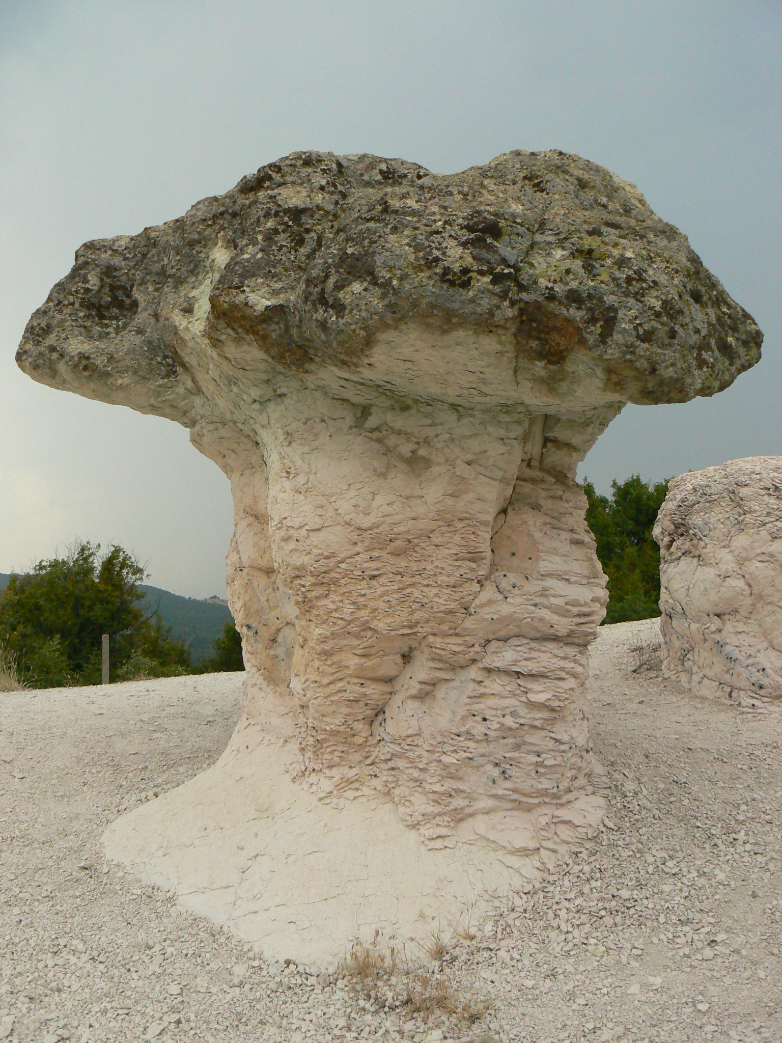 The Stone Mushrooms phenomenon near Beli Plast village, Bulgaria. Феноменът Каменните гъби край с. Бели пласт, България.